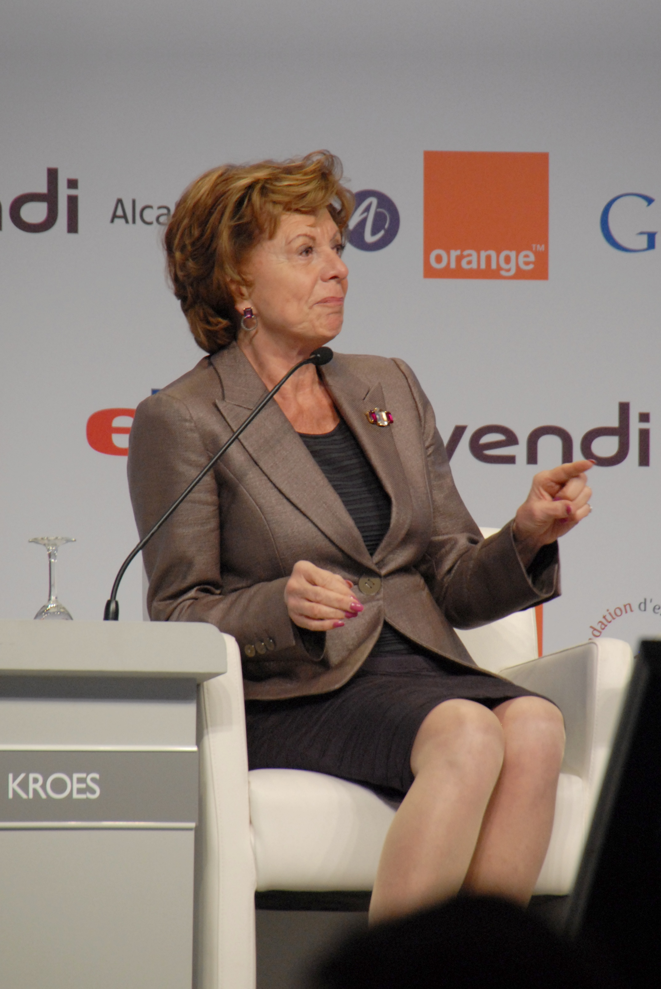 Neelie Kroes, commissaire européenne chargée de la société numérique, lors du discours d'ouverture de la deuxième journée de l'e-G8